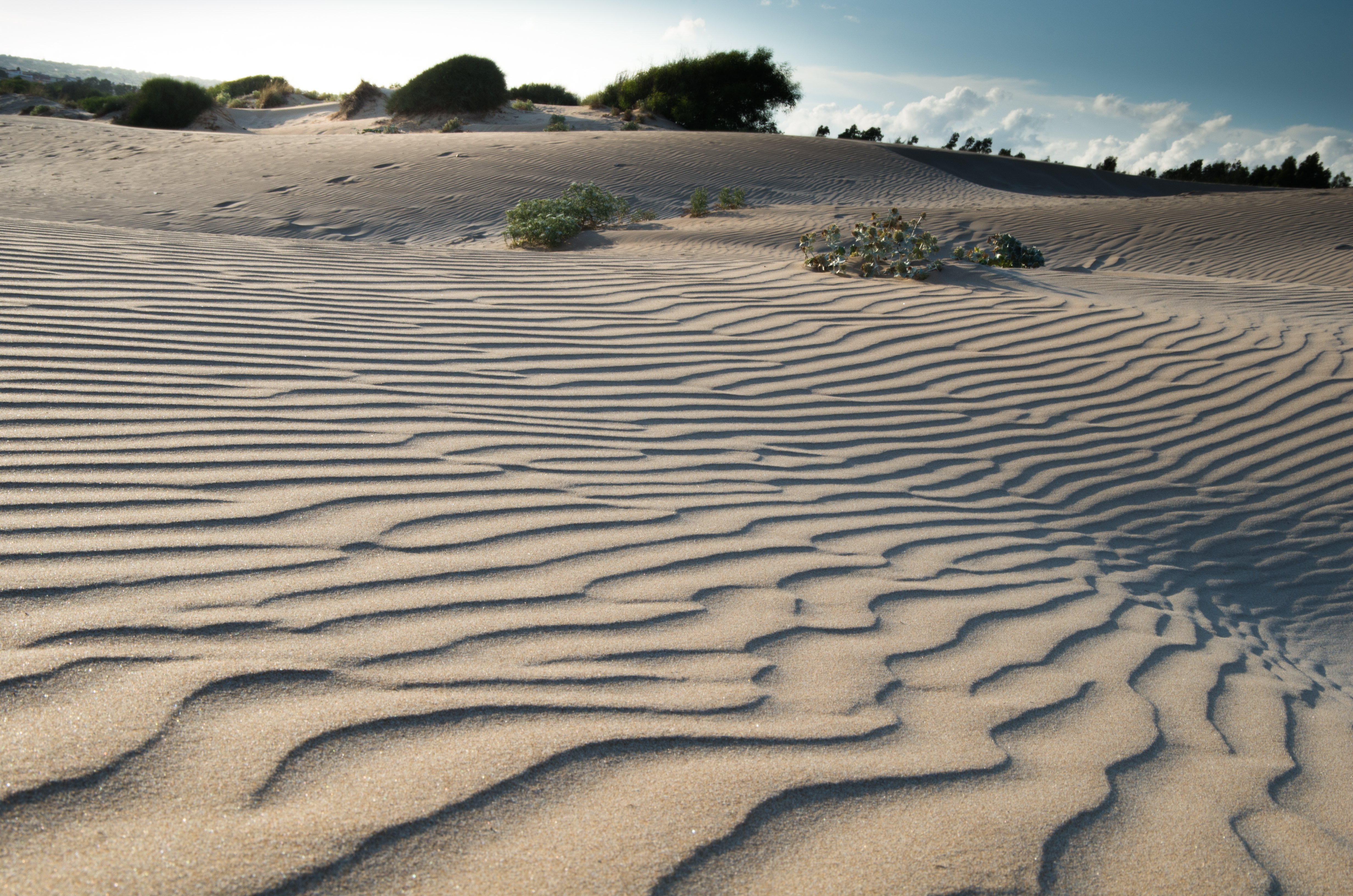 _IMG2162